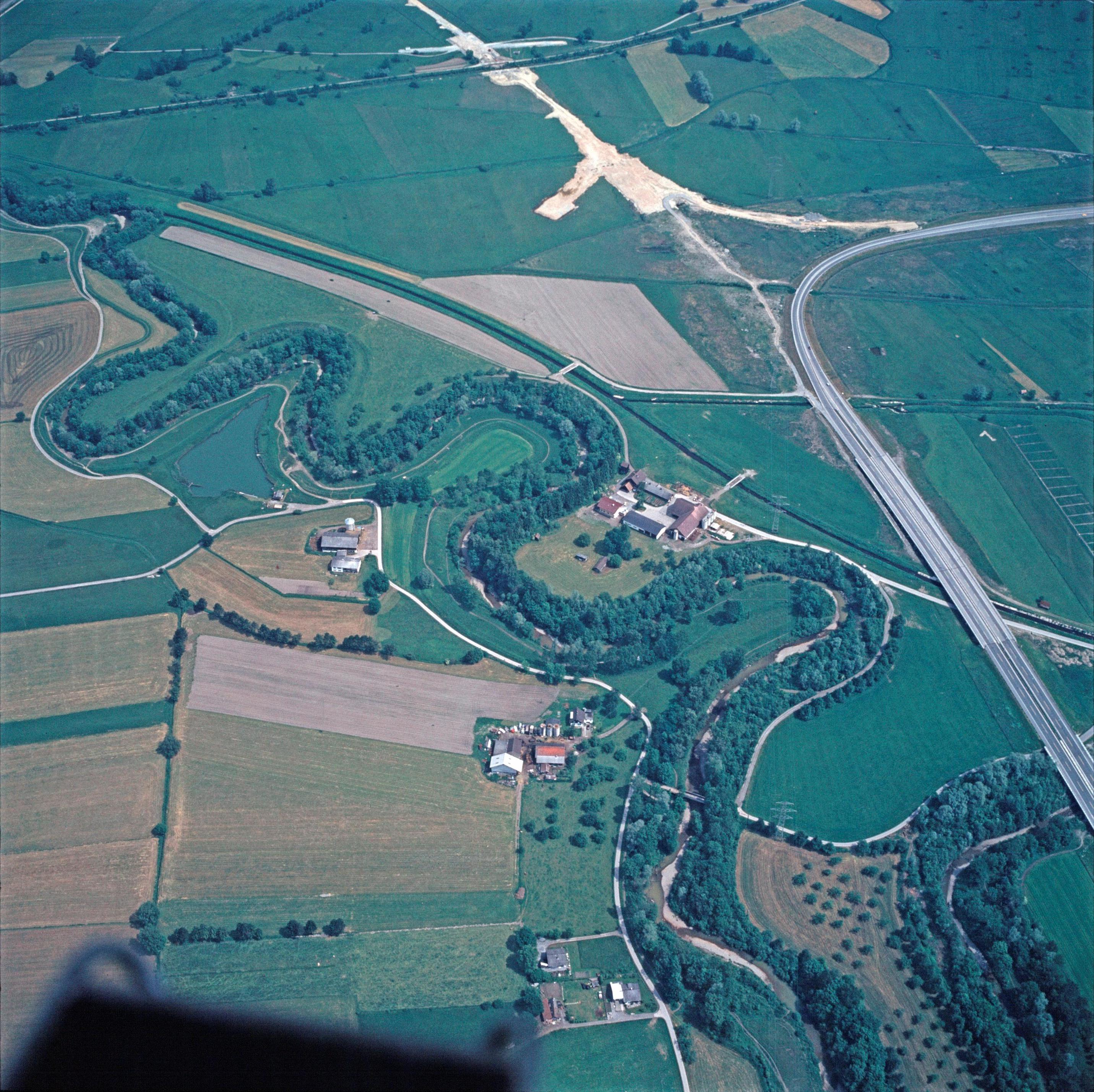 Die Mäander der Dornbirner Ach im Jahr 1977. Gut erkennbar ist auf der rechten Seite des Bilds auch die zu diesem Zeitpunkt hier bei Dornbirn-Nord endende Rheintal/Walgau Autobahn und die Baustelle zu deren Fortführung Richtung Bregenz.